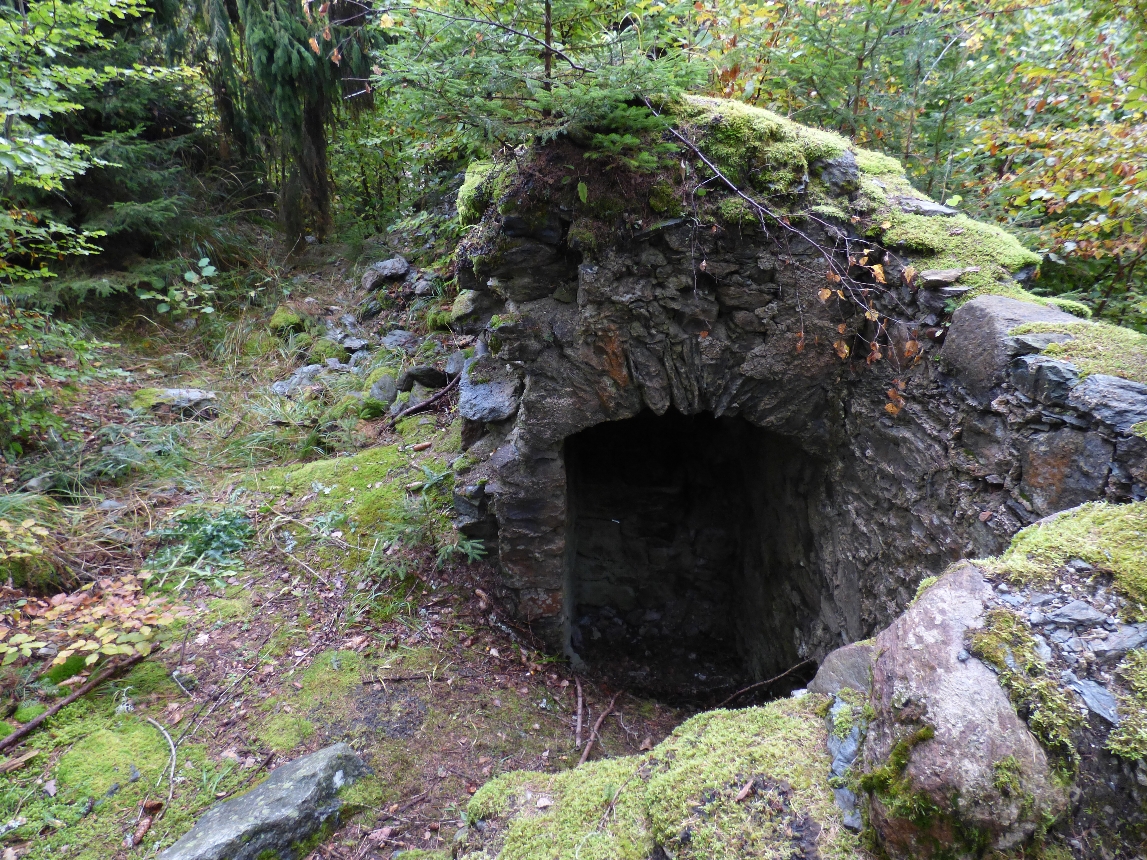 Burgruine Steuerberg (Marbauerschloss), Gemeinde Steuerberg, Kärnten. Abgang im südlichen Teil